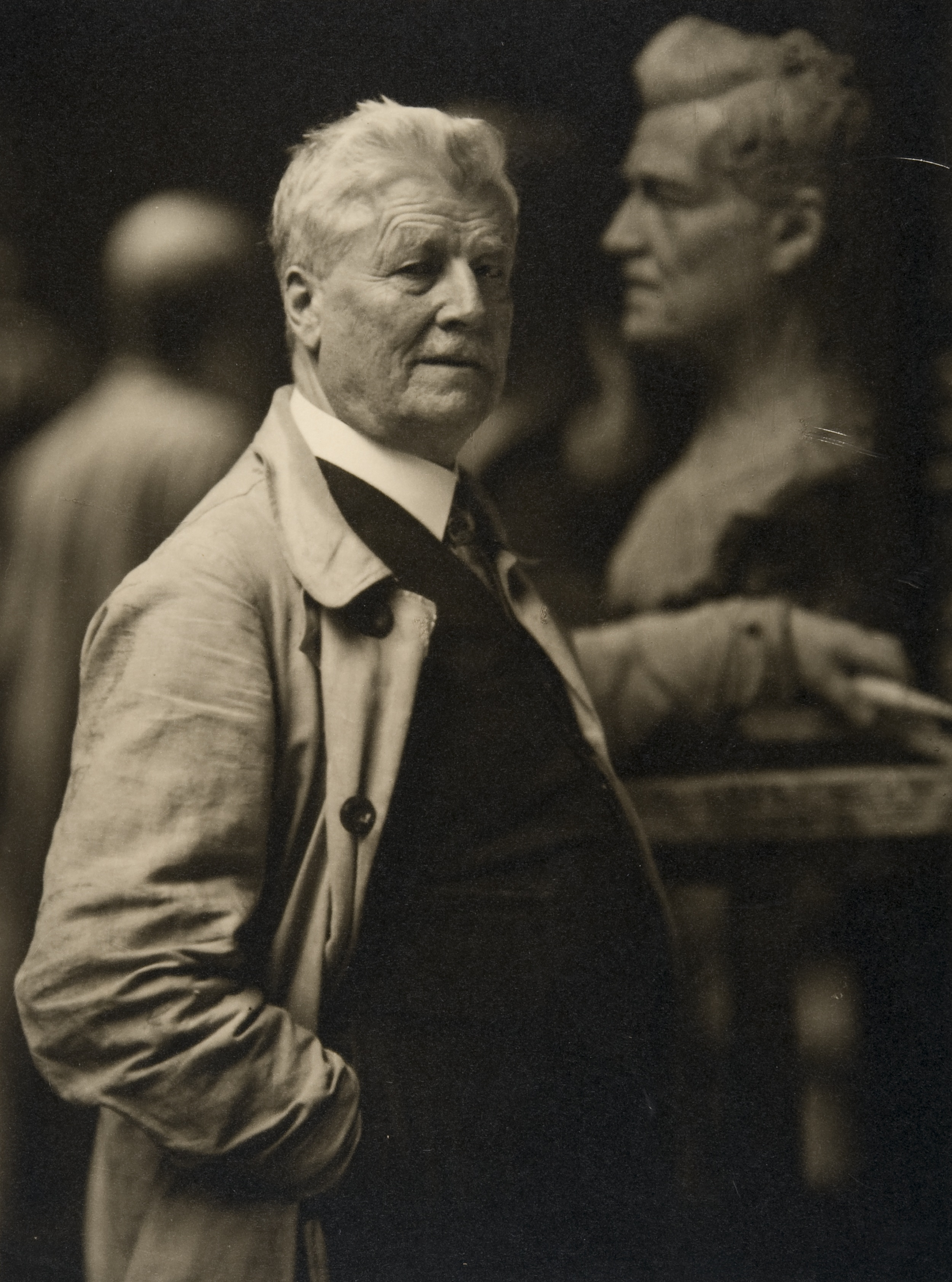 Kuvanveistäjä Emil Wikström 1930-luvulla.